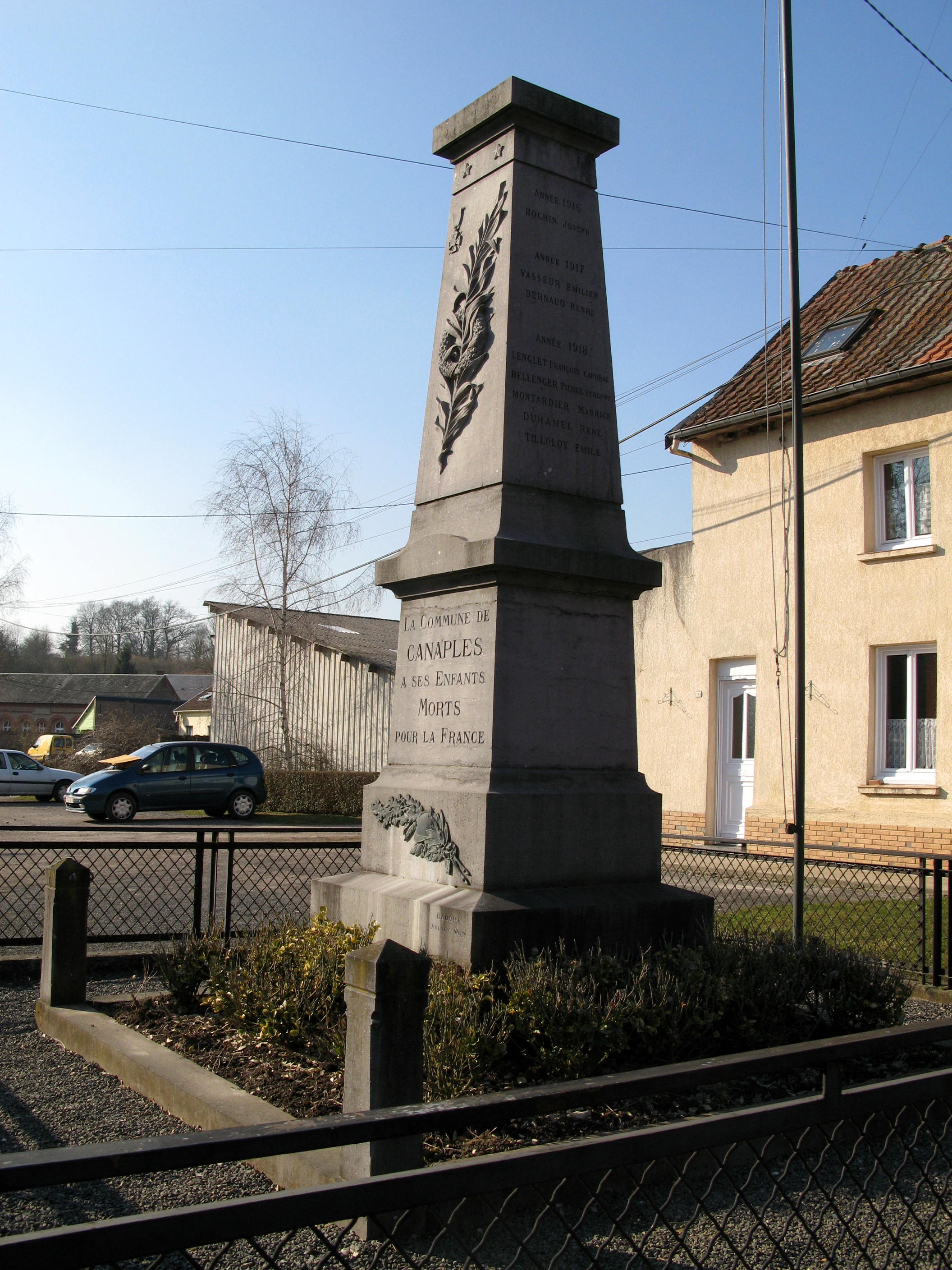 Canaples (Somme, France) - Le monument-aux-morts. .